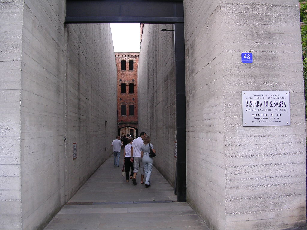 Risiera di San Sabba Dichiaro di aver personalmente fotografato questo luogo e di essere il proprietario del copyright di questa immagine che dono a Wikipedia, a futura memoria dell'orrore dello sterminio di esseri umani. Aanto 14:47, Set 15, 2004 (UTC)